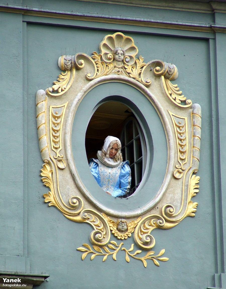 "Panienka z okienka" czyli jedna z gdańskich atrakcji, nawiązujących do powieści Jadwigi Łuszczewskiej (pseudonim Deotyma), pod tym samym tytułem.